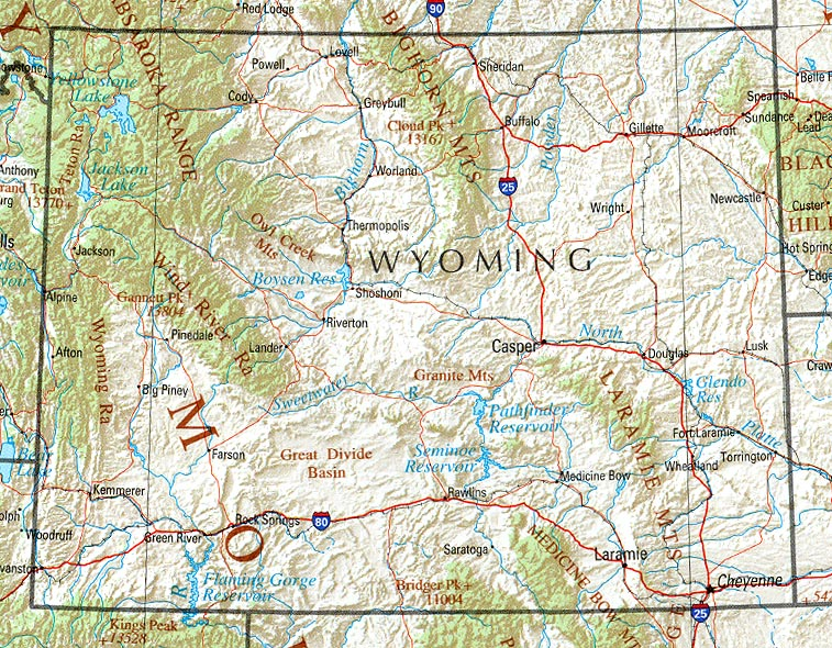 Geographische Karte Wyomings